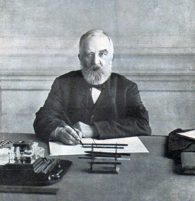 Кобеко, Дмитрий Фомич